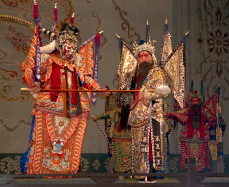 Chinese opera, Beijing